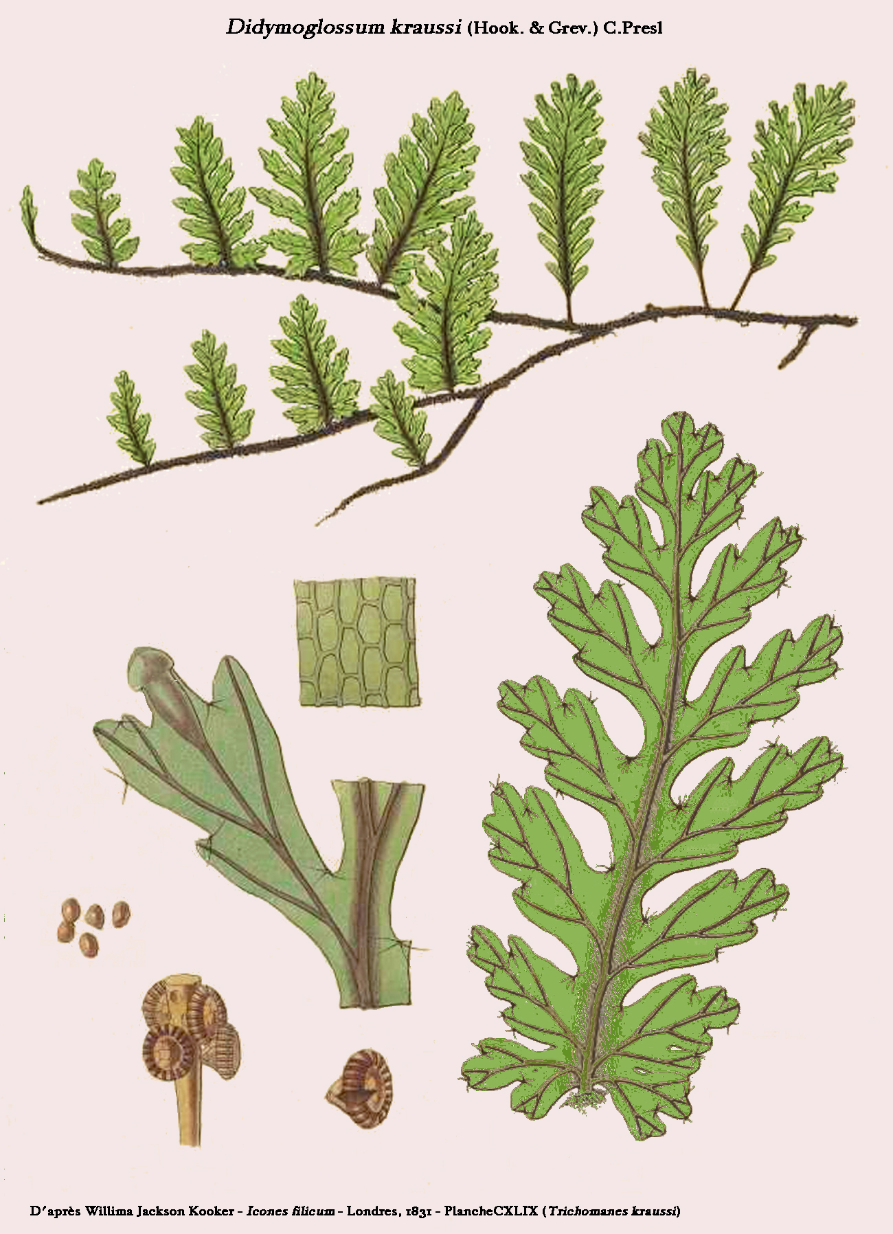 Didymoglossum kraussi (Trichomanes kraussi) - D'après William Jackson Hooker - Icones filicum - 1831 - Planche reprise par D.Prévôt